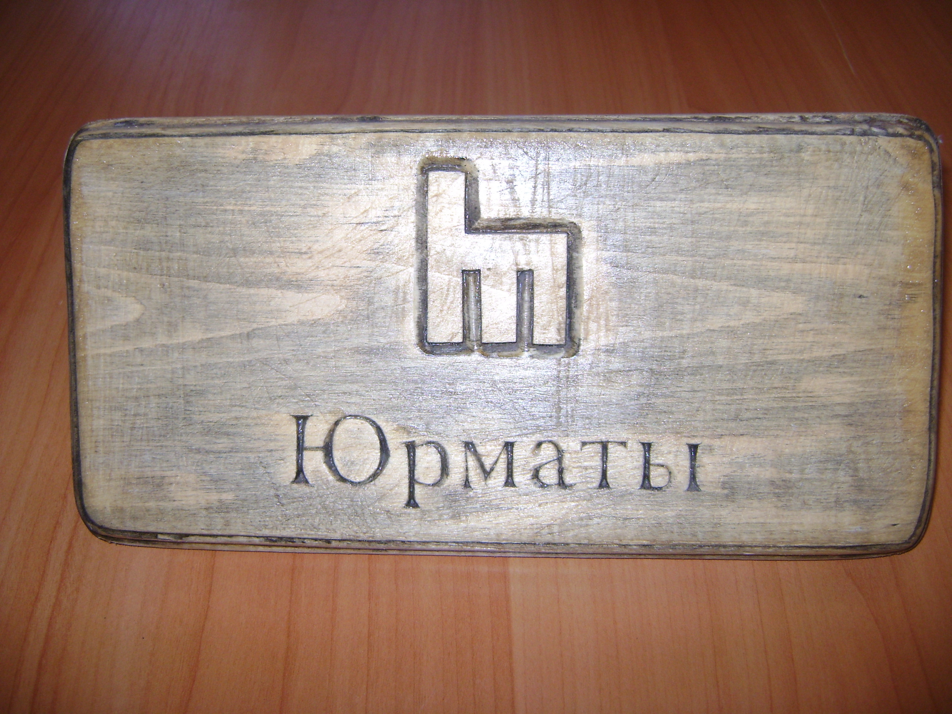 Тамга башкирского племени Юрматы